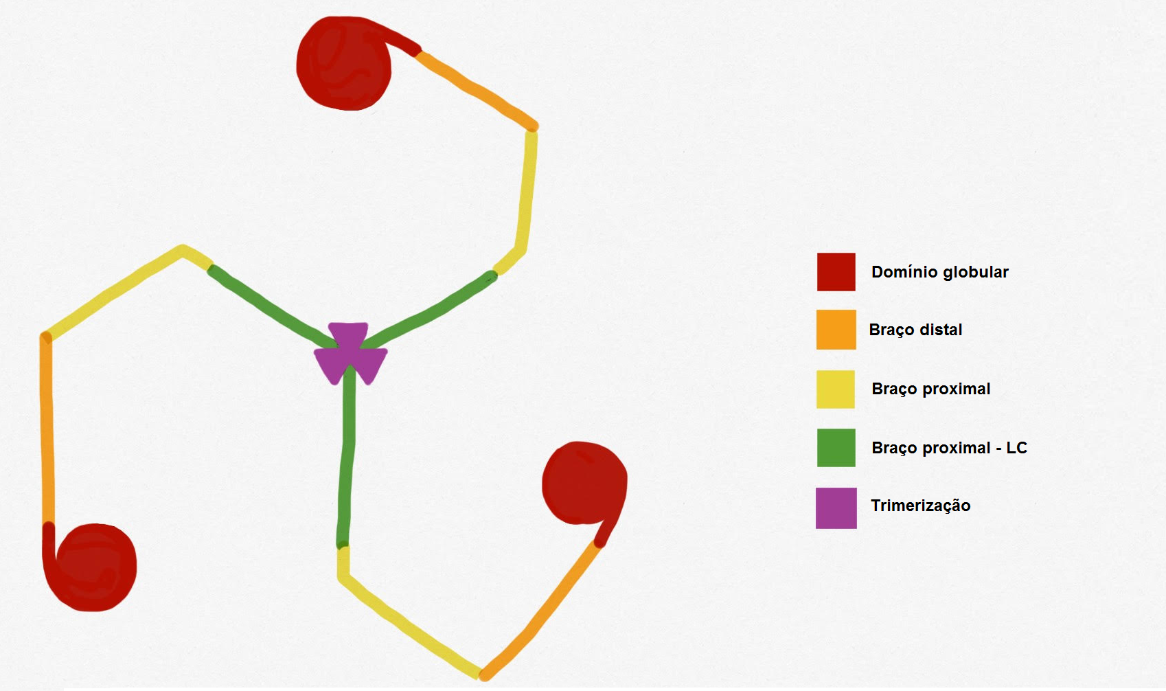 A figura mostra as divisões das cadeias pesadas.